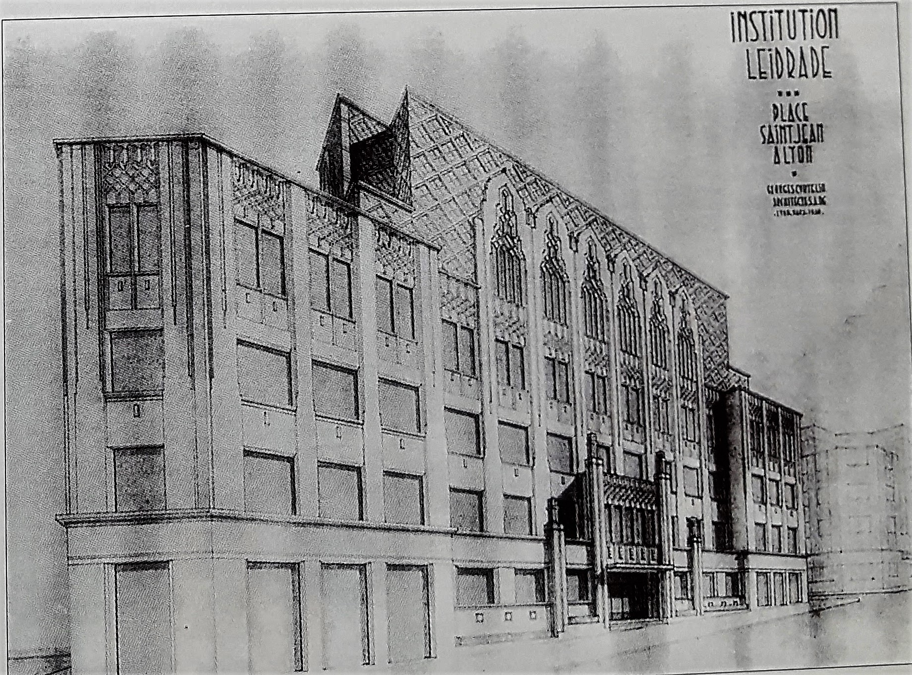 Illustration du second projet pour le petit séminaire Saint Jean datant de 1938